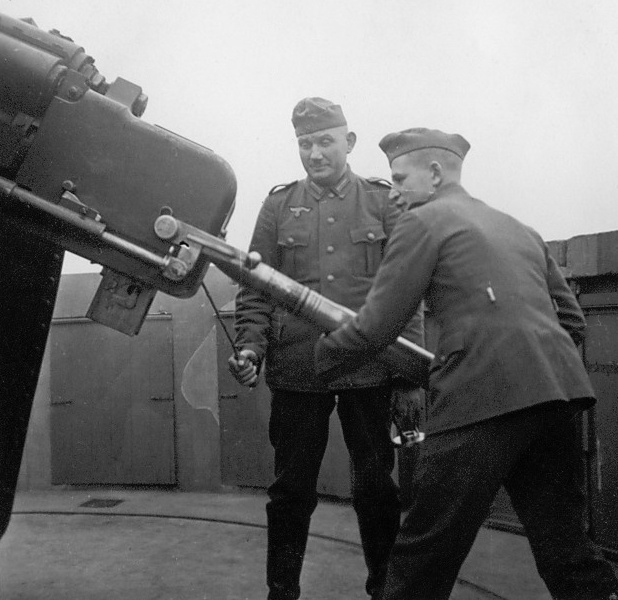 Flakschießen in Wesermünde.